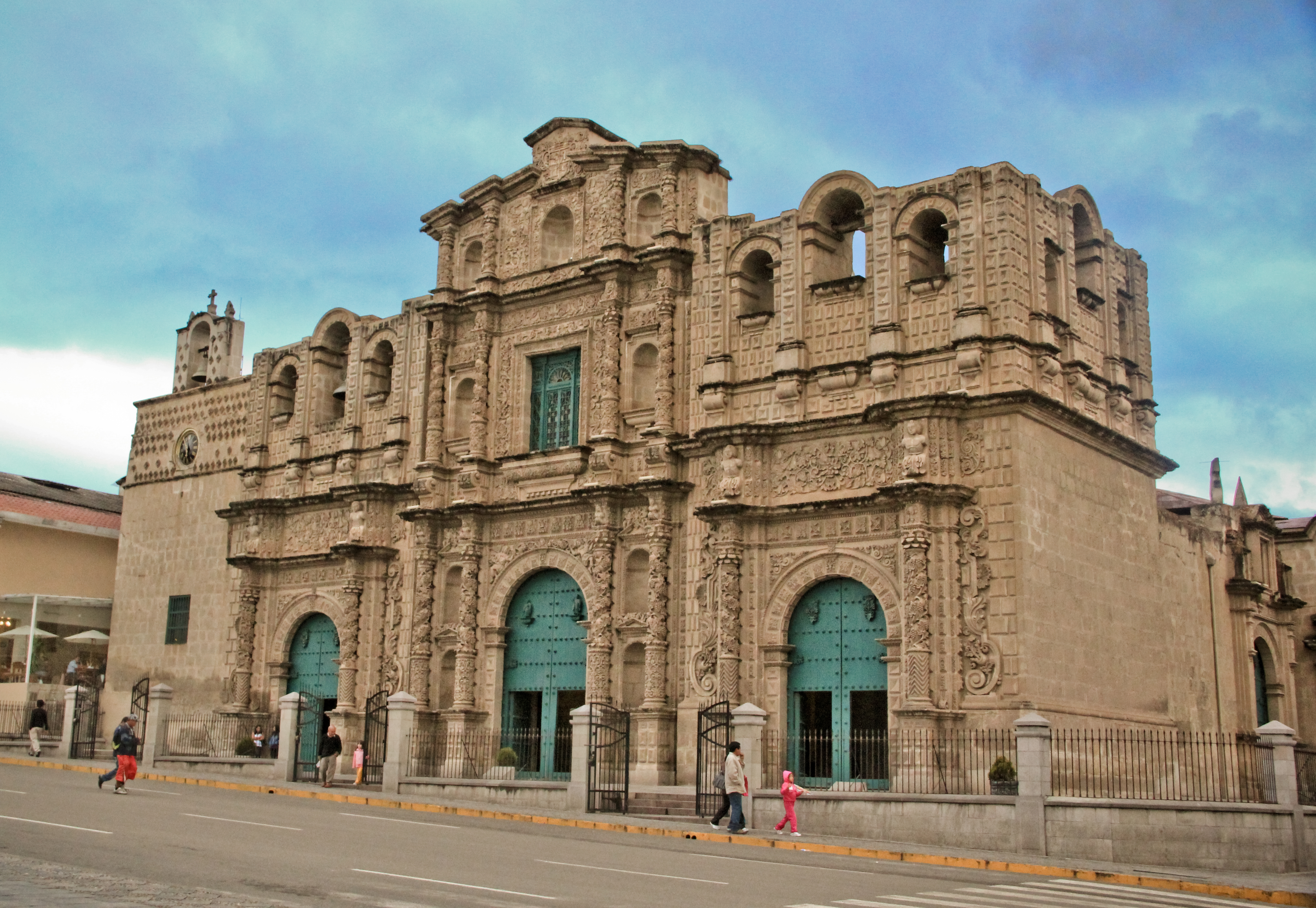 Cajamarca, Perú